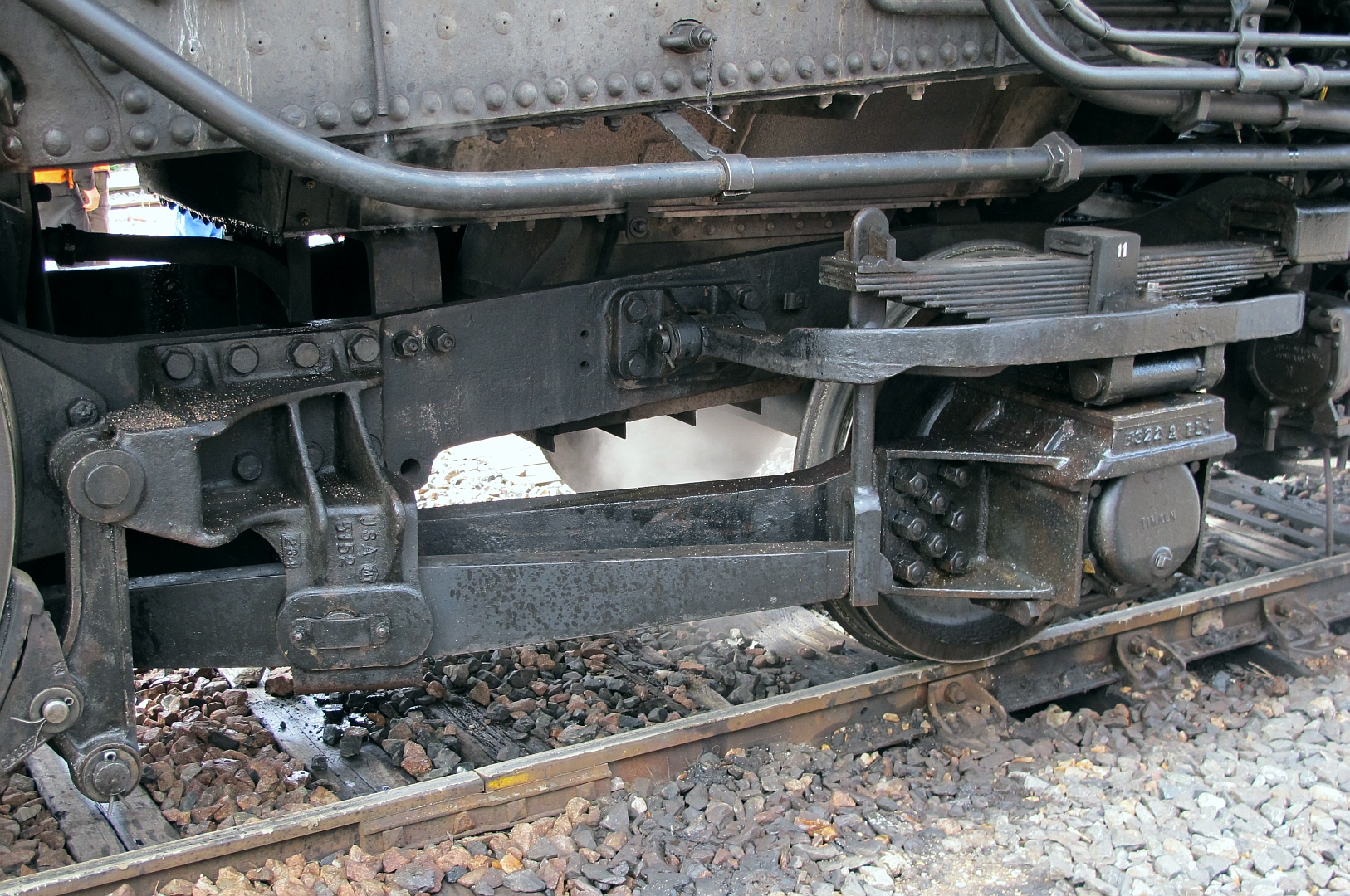 Le bissel Cole de la 141 R 840.